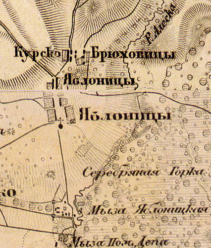 Деревня Яблоницы на карте 1863 года.